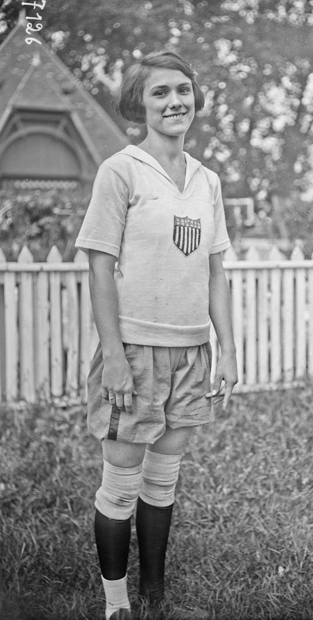 [10-8-22, Colombes,] miss Camelia Sabie, haies : [photographie de presse] / [Agence Rol]